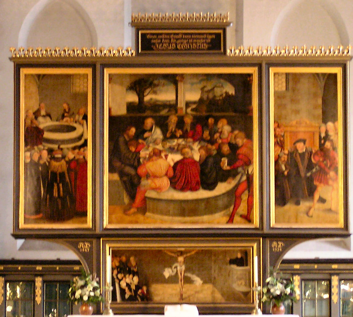 Stadtkirche, Wittenberg, Cranach Alterbild